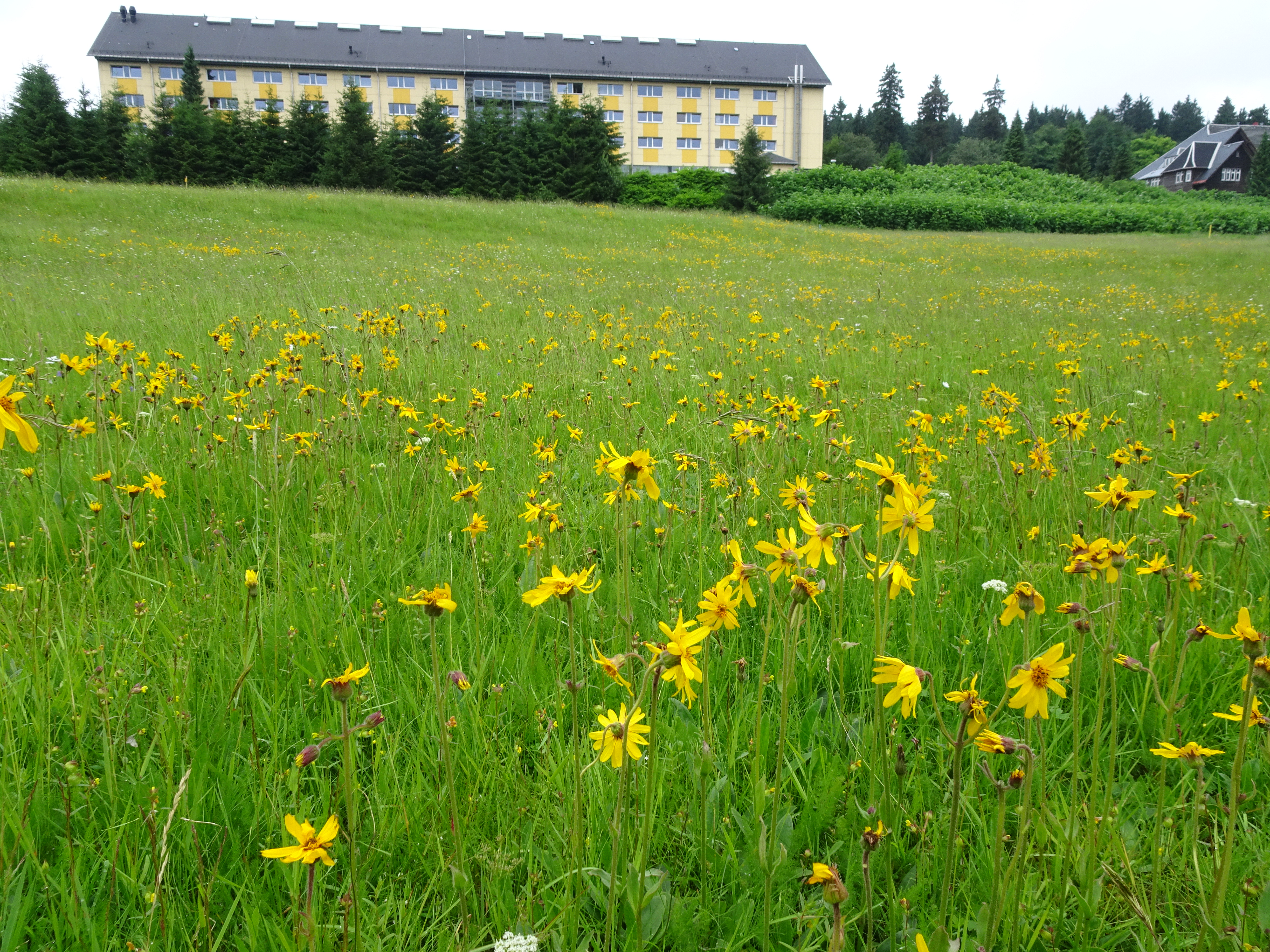 Arnika (Arnica montana) auf der Schuderbachswiese in Oberhof (Blickrichtung NO)